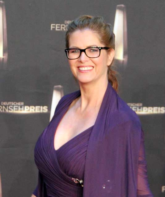 Maxi Biewer beim Deutschen Fernsehpreis 2012